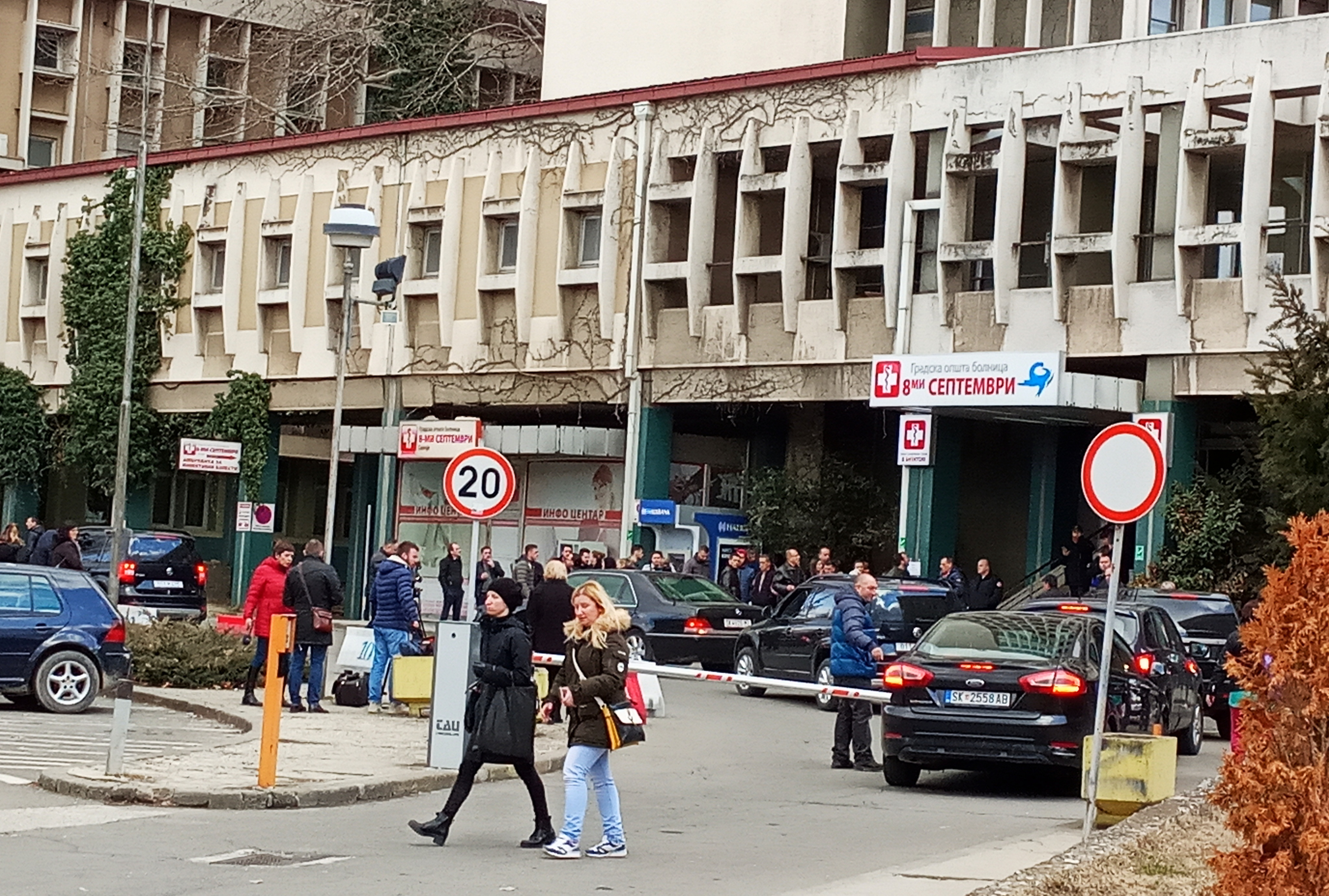 Насобрани луѓе чекаат информации од болницата 8ми септември во Скопје, после автобуската несреќа кај Ласкарци.